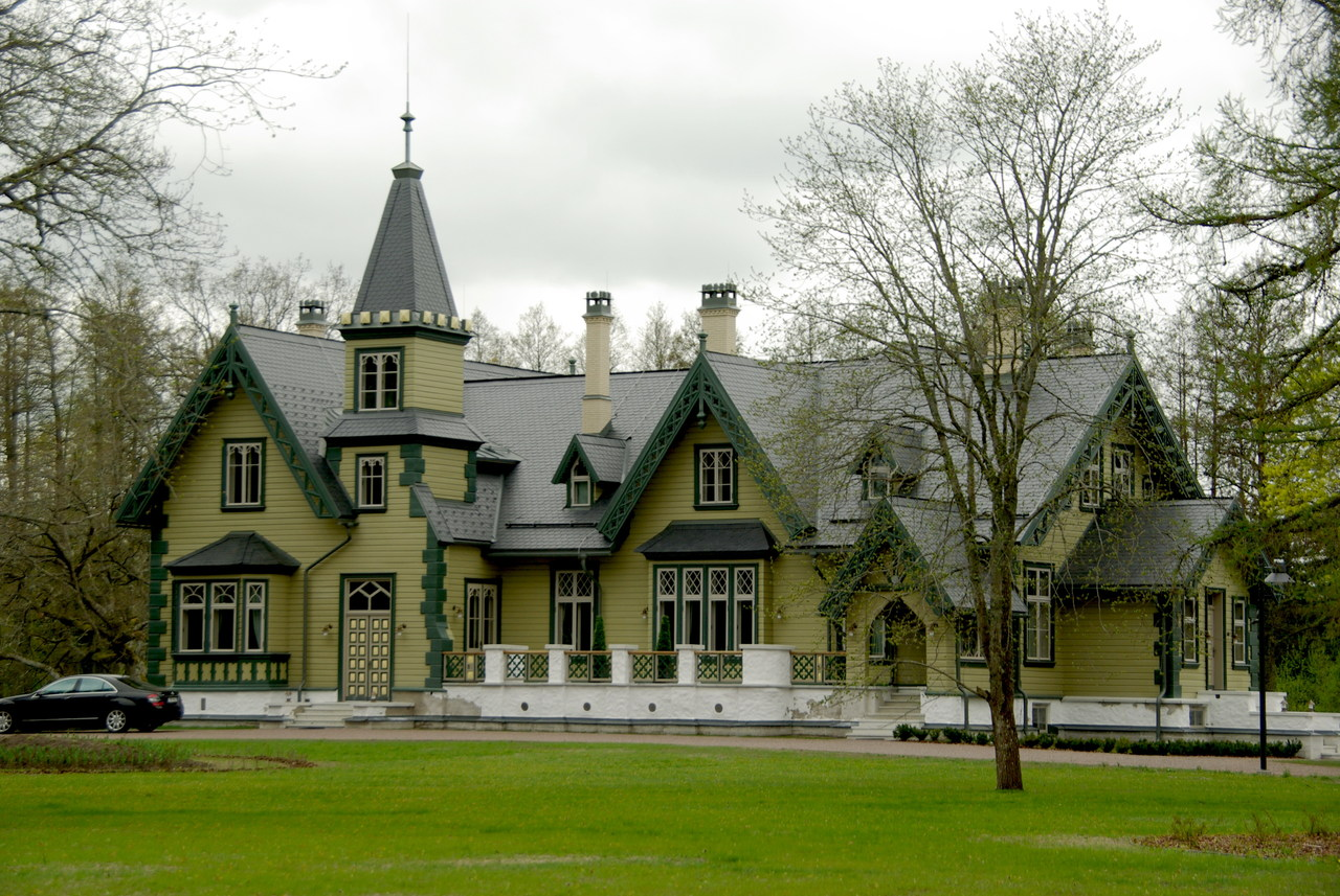 poolmõis Harjumaal Keila valla territooriumil